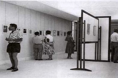 תערוכת צילום בבית וילפריד, 1958